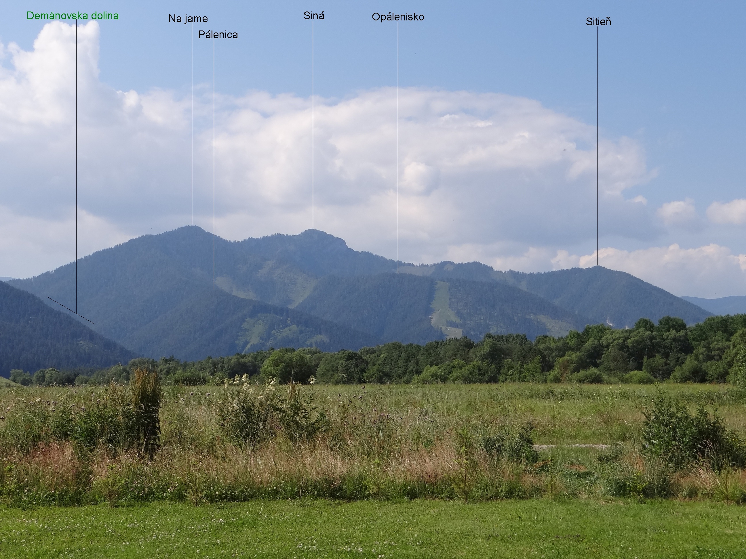 Demänovská dolina, Siná